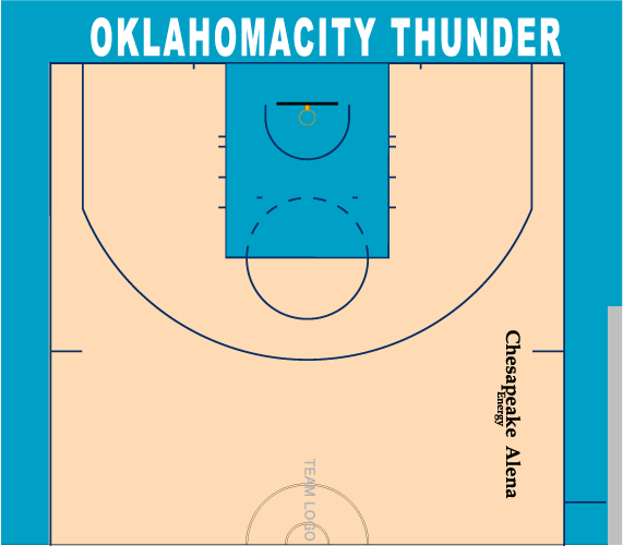 サンダーホームコート配色